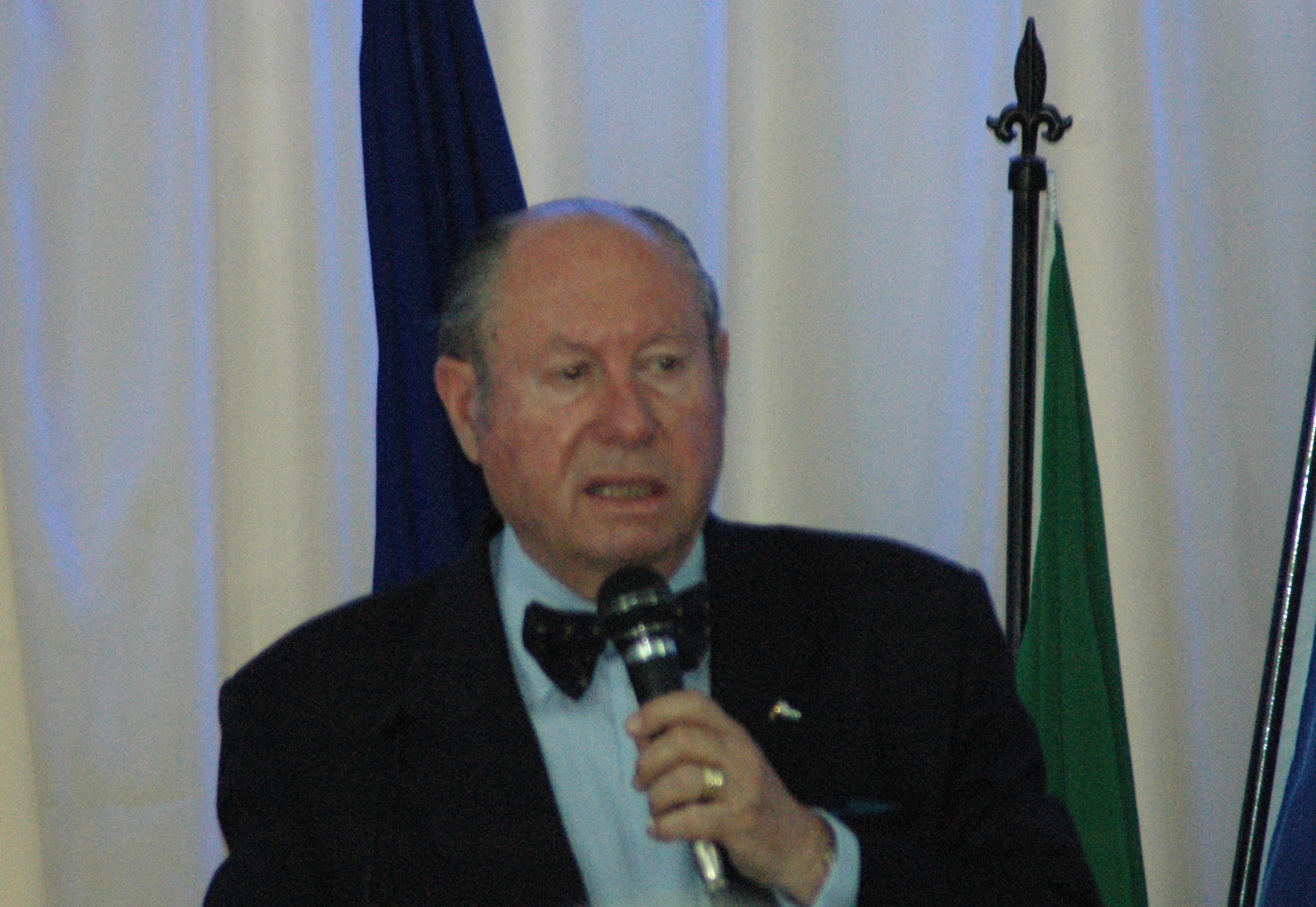 Una conferenza di Gaetano Allotta